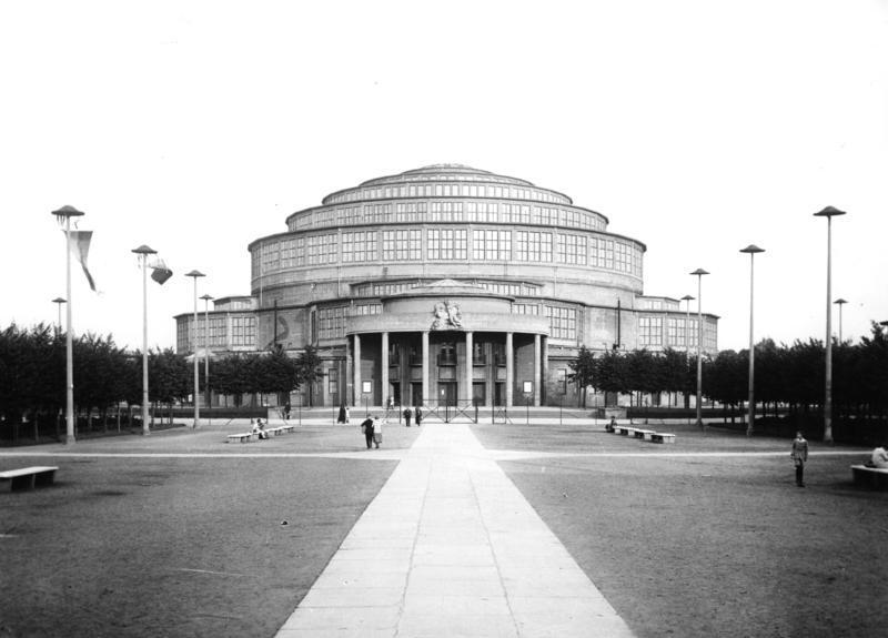 Breslau/Niederschlesien Jahrhunderthalle